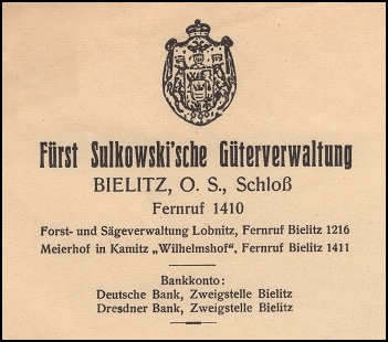 Nagłówek papieru firmowego zarządu fideikomisu książąt Sułkowskich w Bielsku, Fürst Sulkowski'sche Güterverwaltung, 1941, Ze zbiorów Muzeum Historycznego w Bielsku-Białej